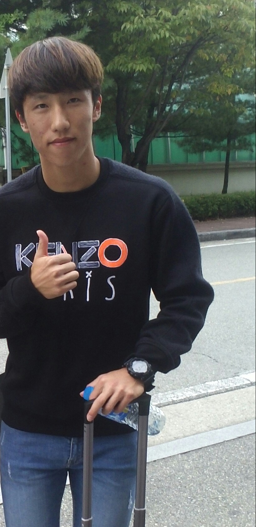 울산시절 이영재